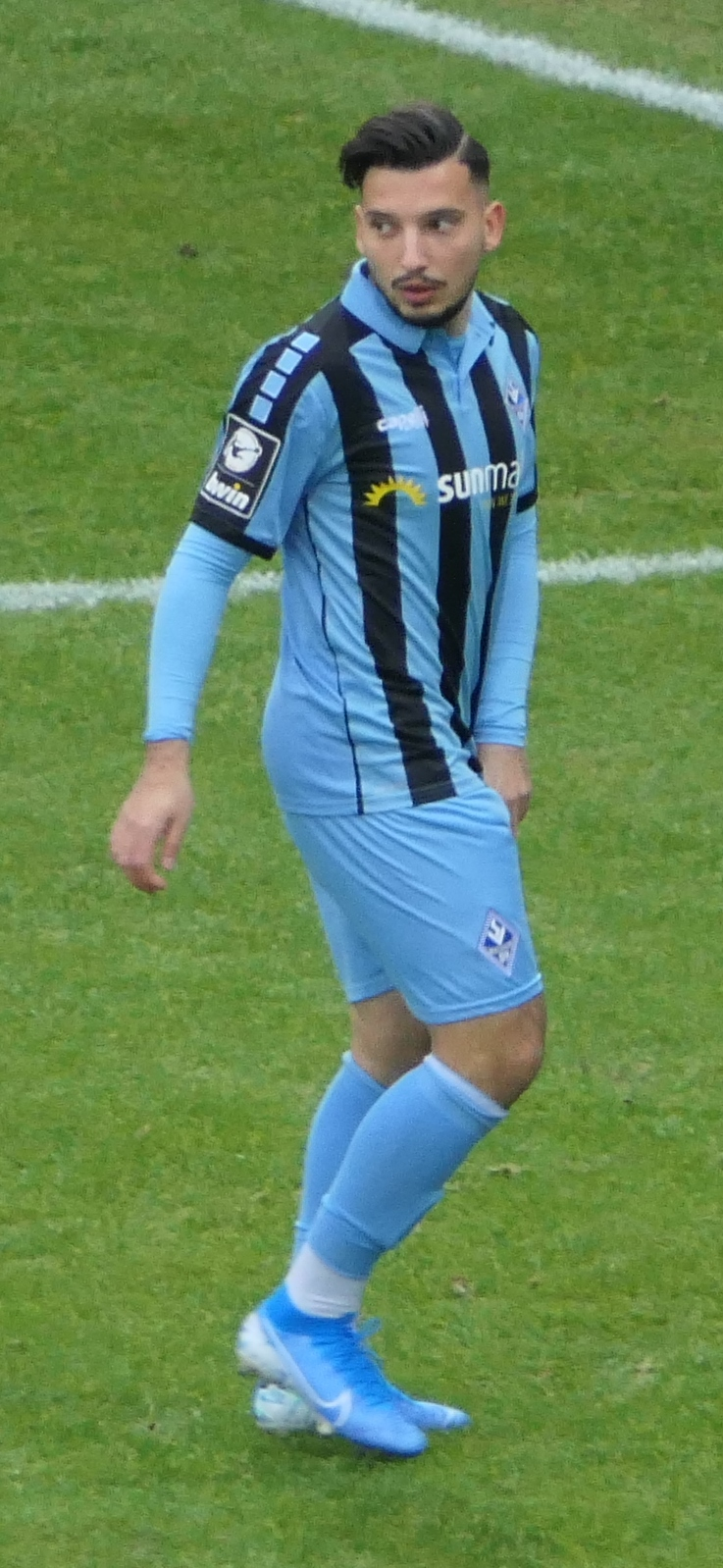 Der Fussballprofi Arianit Ferati im Trikot vom SV Waldhof Mannheim beim Heimspiel gegen Eintracht Braunschweig am 08.12.2019.